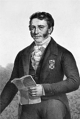 Portret van Jean-Baptiste Minne-Barth (1796-1851), rector 1845/1846